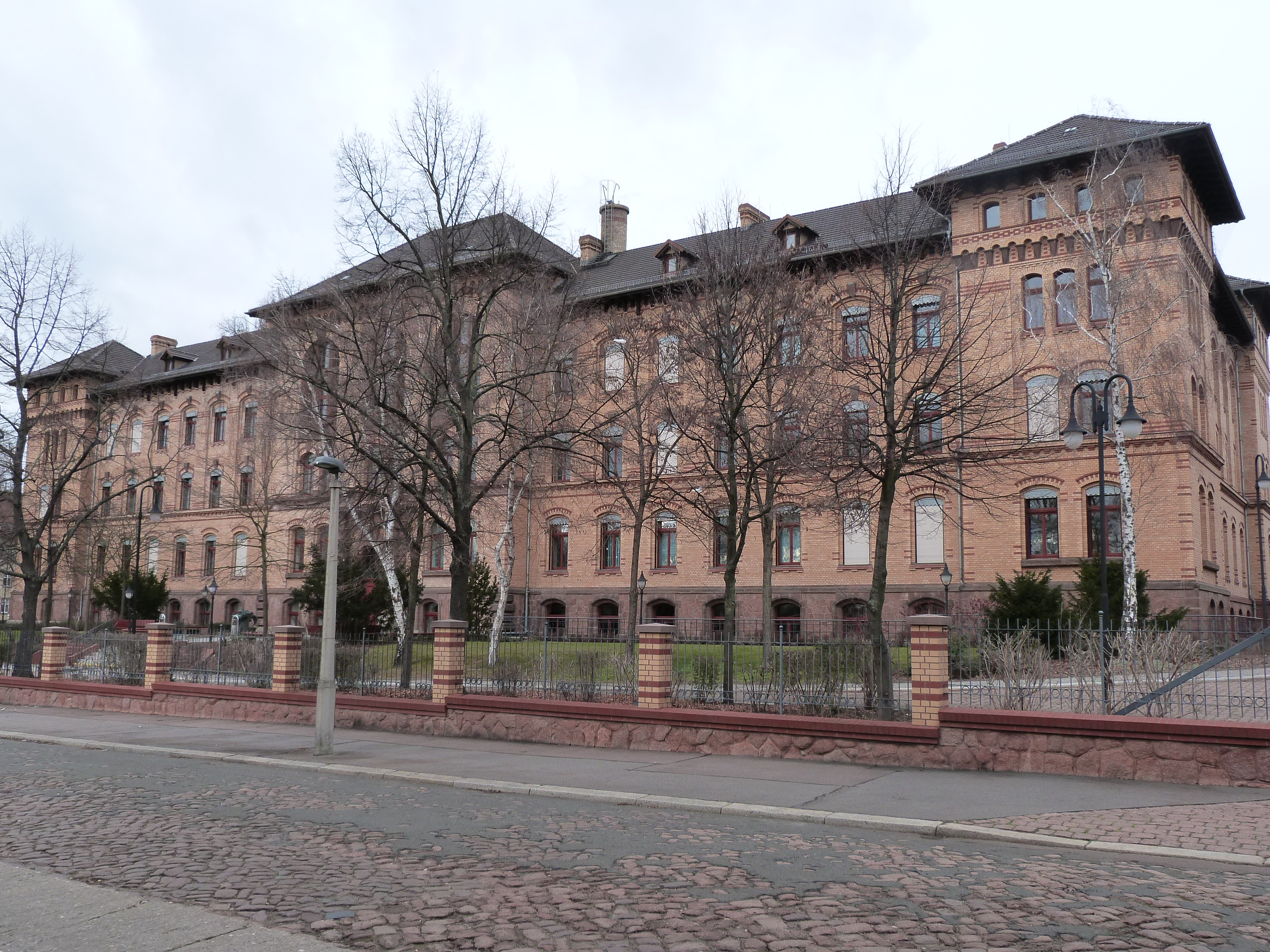 Berufsförderungswerk für Blinde und Sehbehinderte, ehemalige Provinzial-Blindenanstalt (1893-1898), Bugenhagenstraße 30, Halle (Saale)